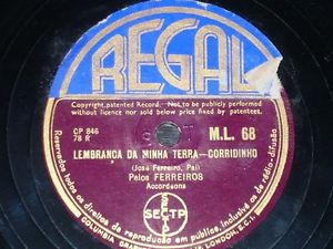 Disco de 78 rotações -Lembrança da Minha Terra-corridinho,gravado pelos Ferreiros